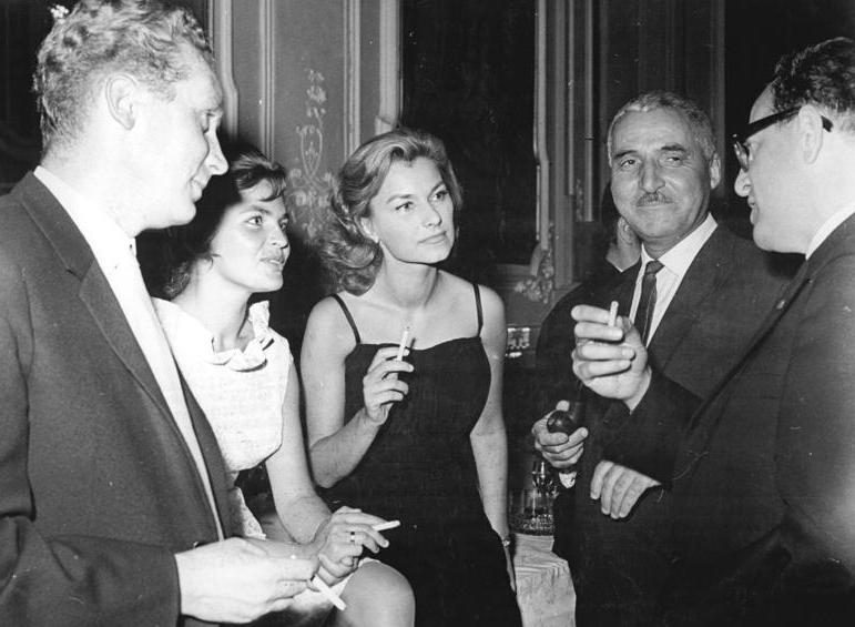 Karlsbad, Filmfestival, Beyer, Bodenstein, Lesser, Simenow, Witt Zentralbild-Hochneder 12.7.1964 14. Internationales Filmfestival in Karlovy Vary Fachsimpelei des sowjetischen Schriftstellers Konstantin Simonow (2.v.r. ) mit dem Stellvertretenden Minister für Kultur der DDR Günter Witt (rechts), und DEFA Regisseur Frank Beyer (links) sowie den DDR Schauspielerinnen Christel Bodenstein (2.v.l.) und Christine Lesser (Mitte) während des festlichen Empfanges anläßlich der Welturaufführung des Films "Der geteilte Himmel" am 9.7.1964 im Hotel "Moskwa" in Karlovy Vary. Abgebildete Personen: Beyer, Frank: Regisseur, DDR (GND 119217899) Witt, Günter: Stellvertretender Minister für Kultur, Friedrich-Ludwig-Jahn-Medaille 1963, DDR Bodenstein, Christel: Schauspielerin, Tänzerin, DDR (GND 119546043) Laszar, Christine: Schauspielerin, DDR Simonow, Konstantin: Schriftsteller, Sowjetunion #